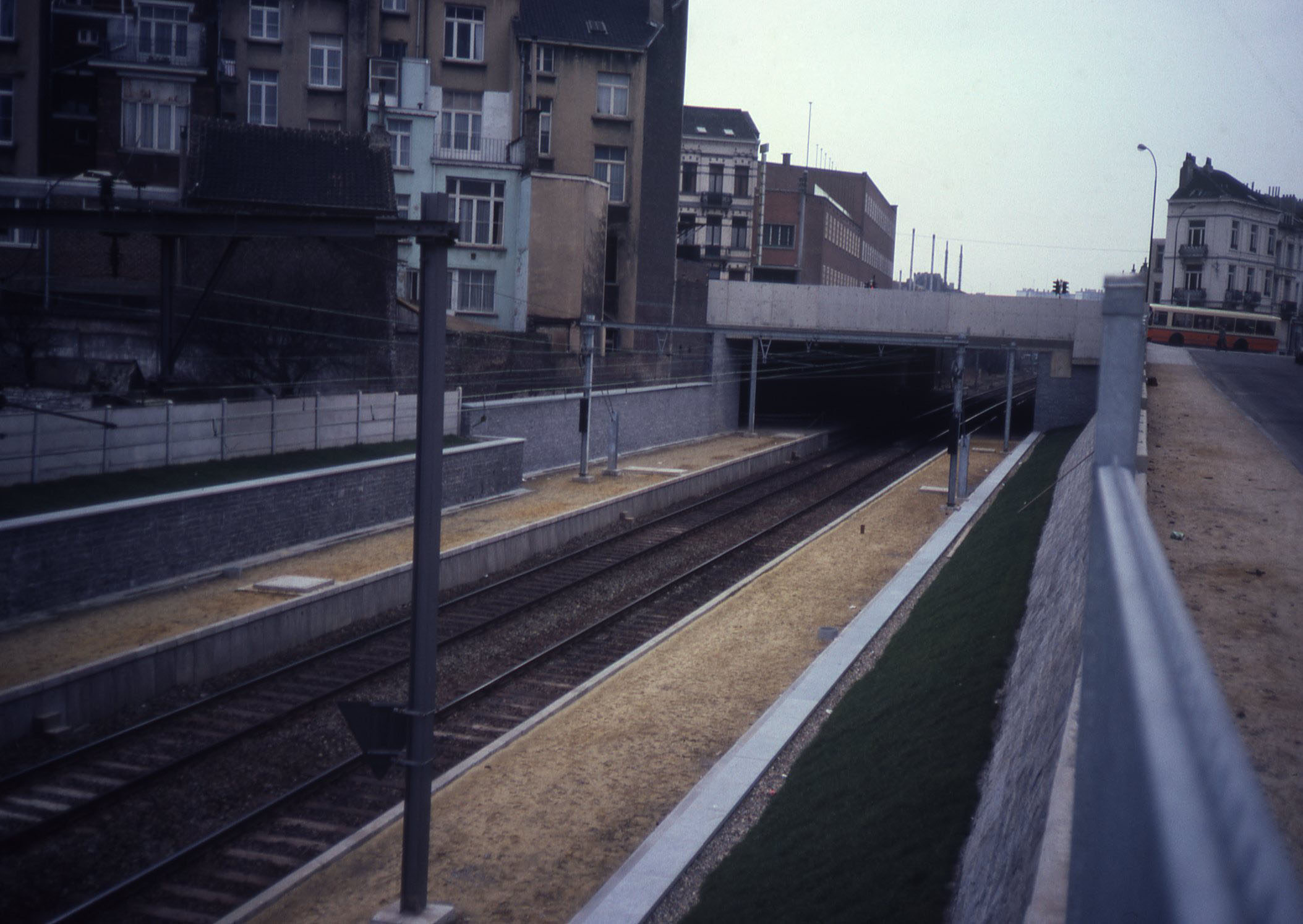 Het in aanbouw zijnde station Bockstael op de spoorlijn Brussel - Jette.